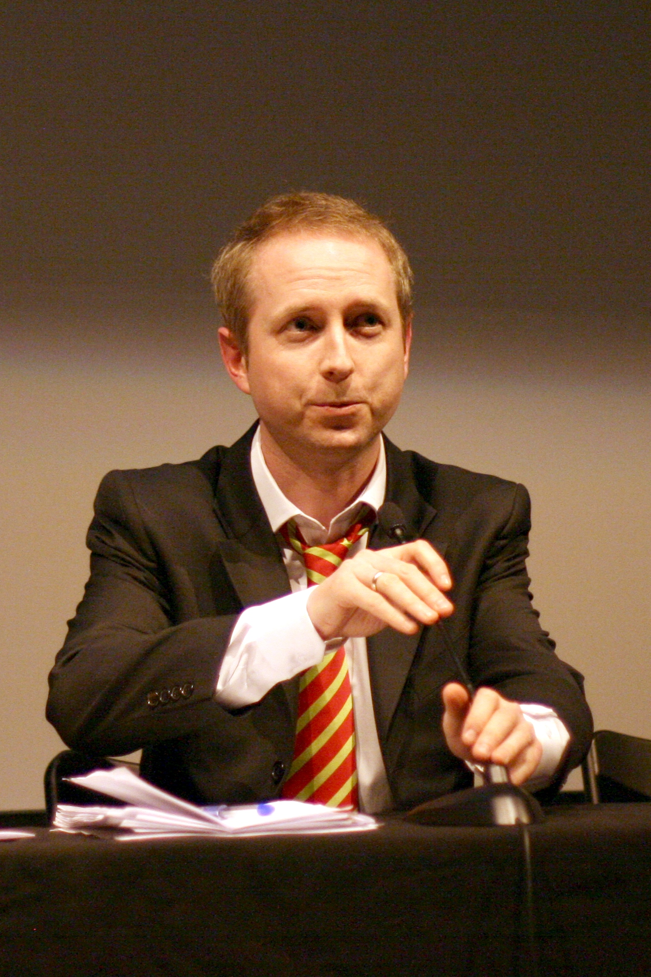 Bård Vegar Solhjell (SV) under paneldebatten i forbindelse med førpremieren på filmen Urospredere.